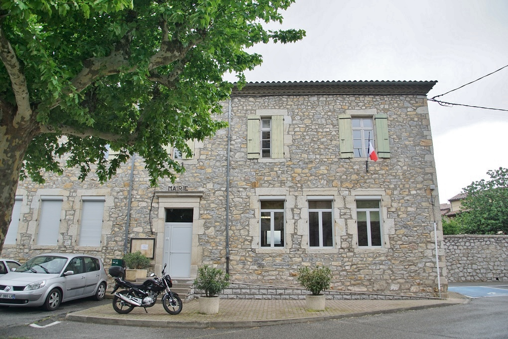 la Mairie